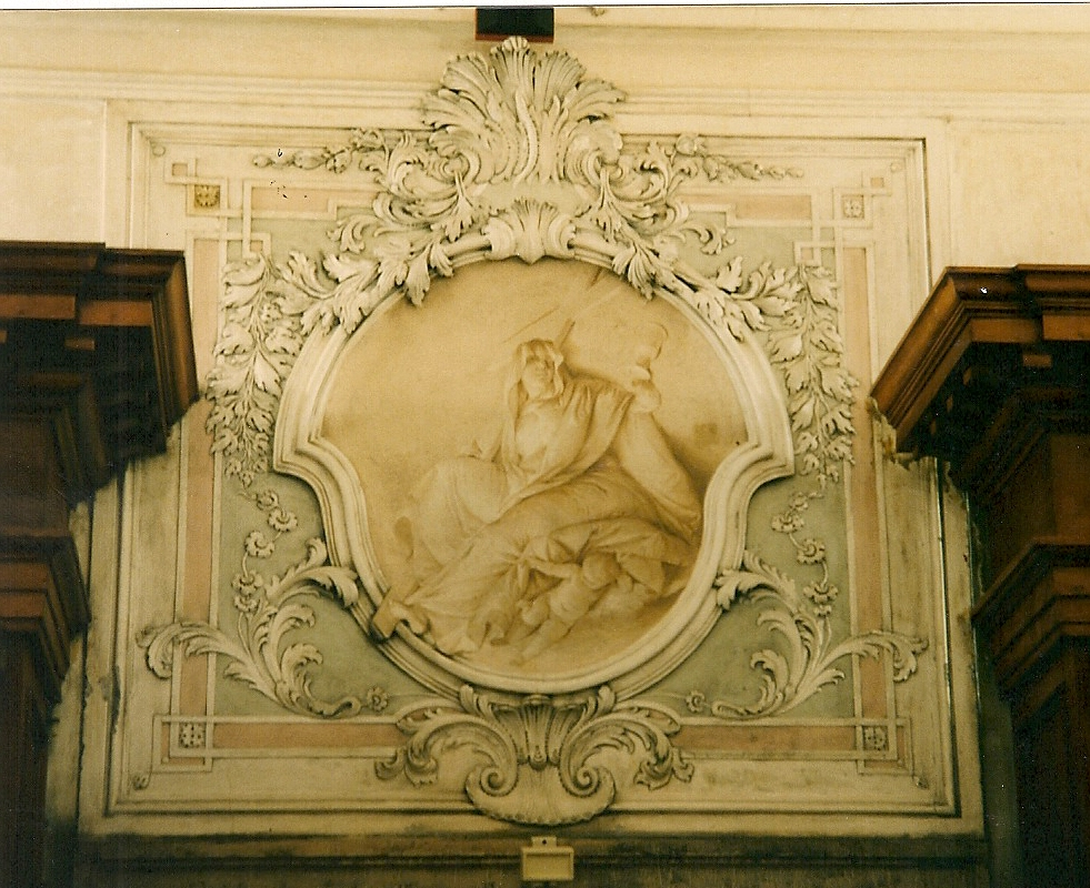 Allégorie de la Foi